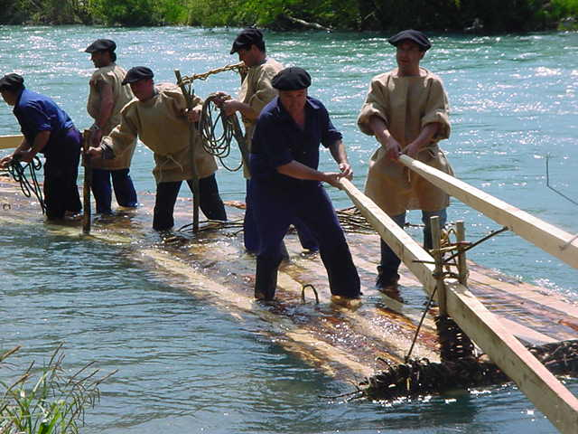 Radeleurs sur le gave d'Aspe (Pyrénées-Atlantiques) (Pyrénées).